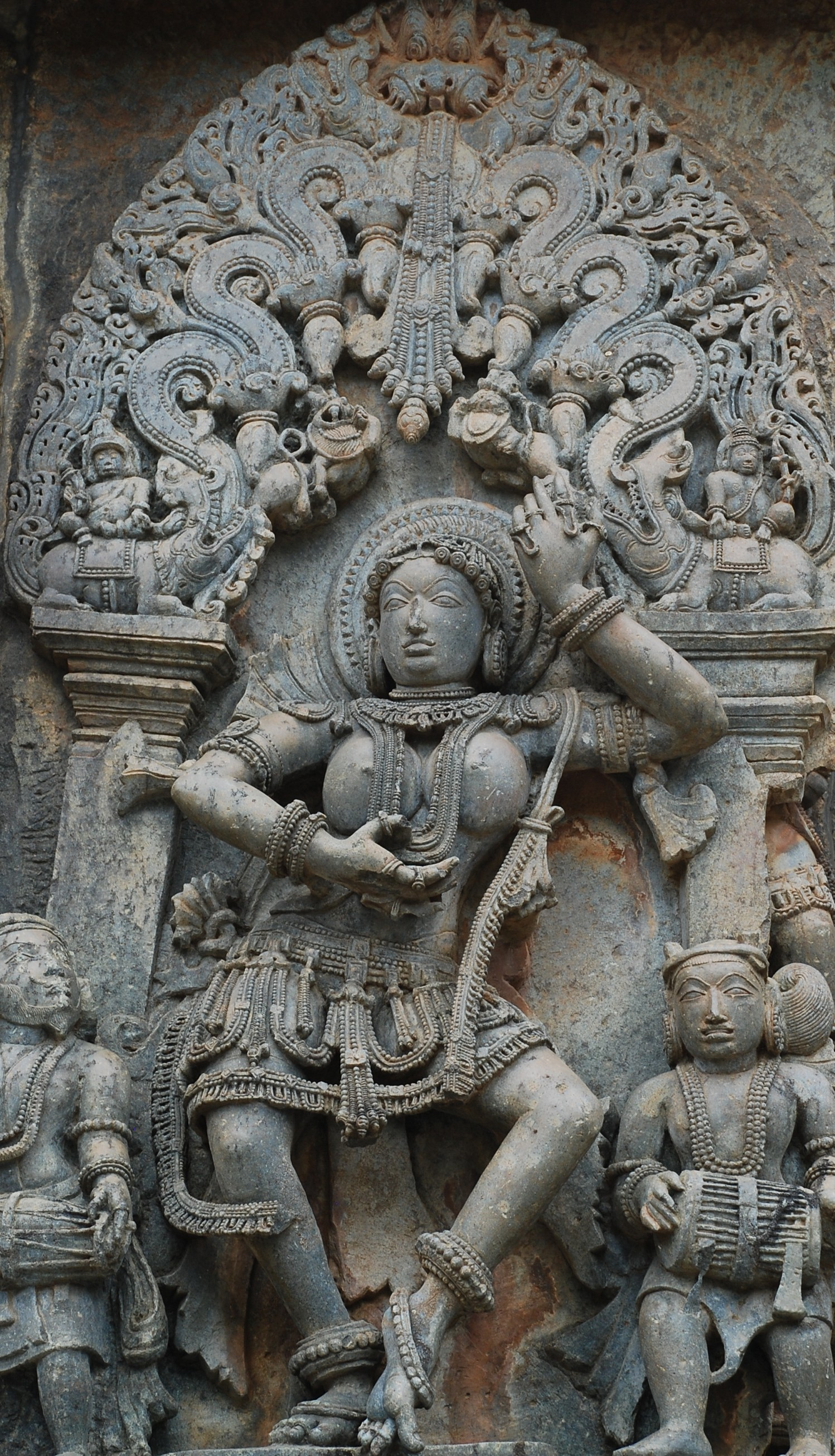 ಕನ್ನಡ: ನರ್ತನದಲ್ಲಿ ತ್ರಿಭಂಗಿ